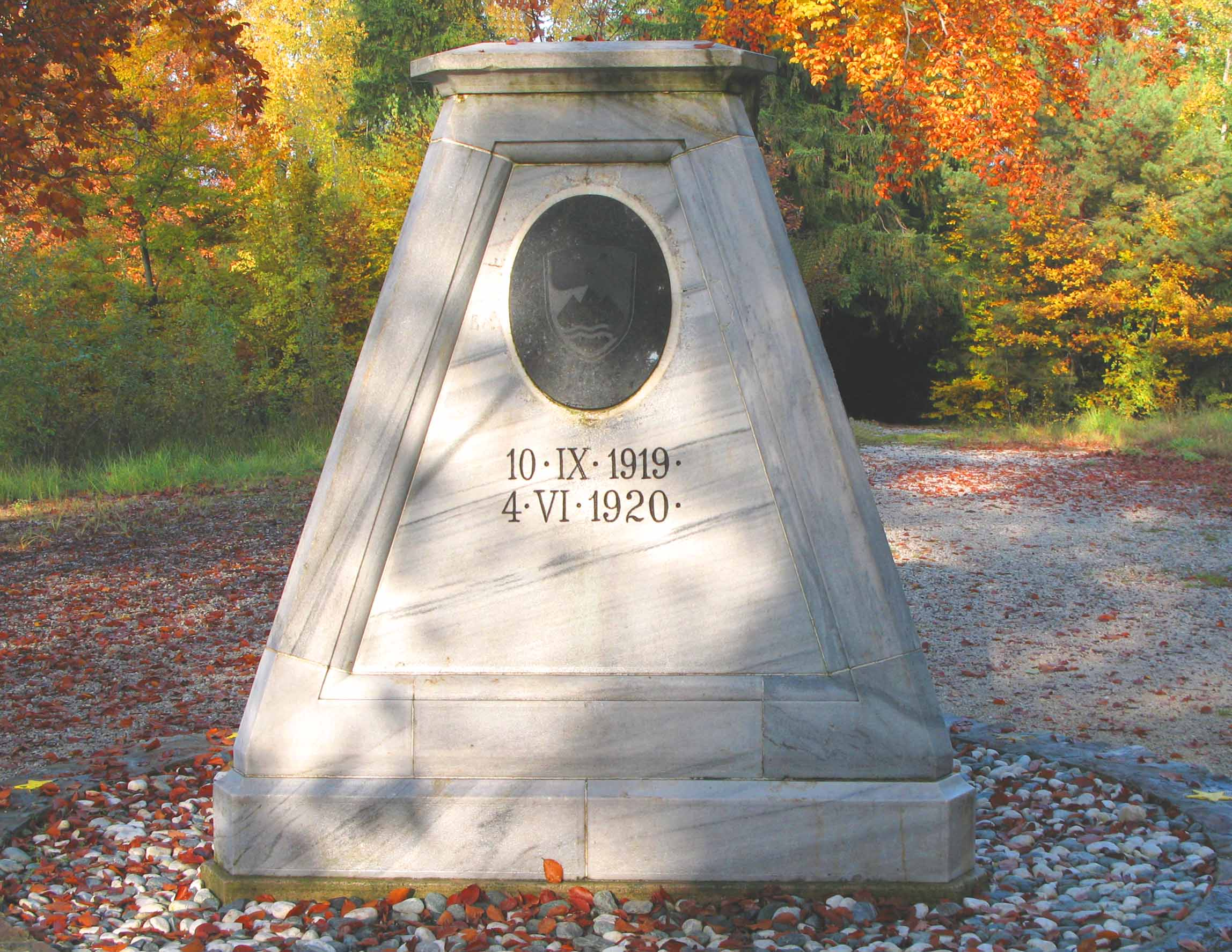 Grenzstein